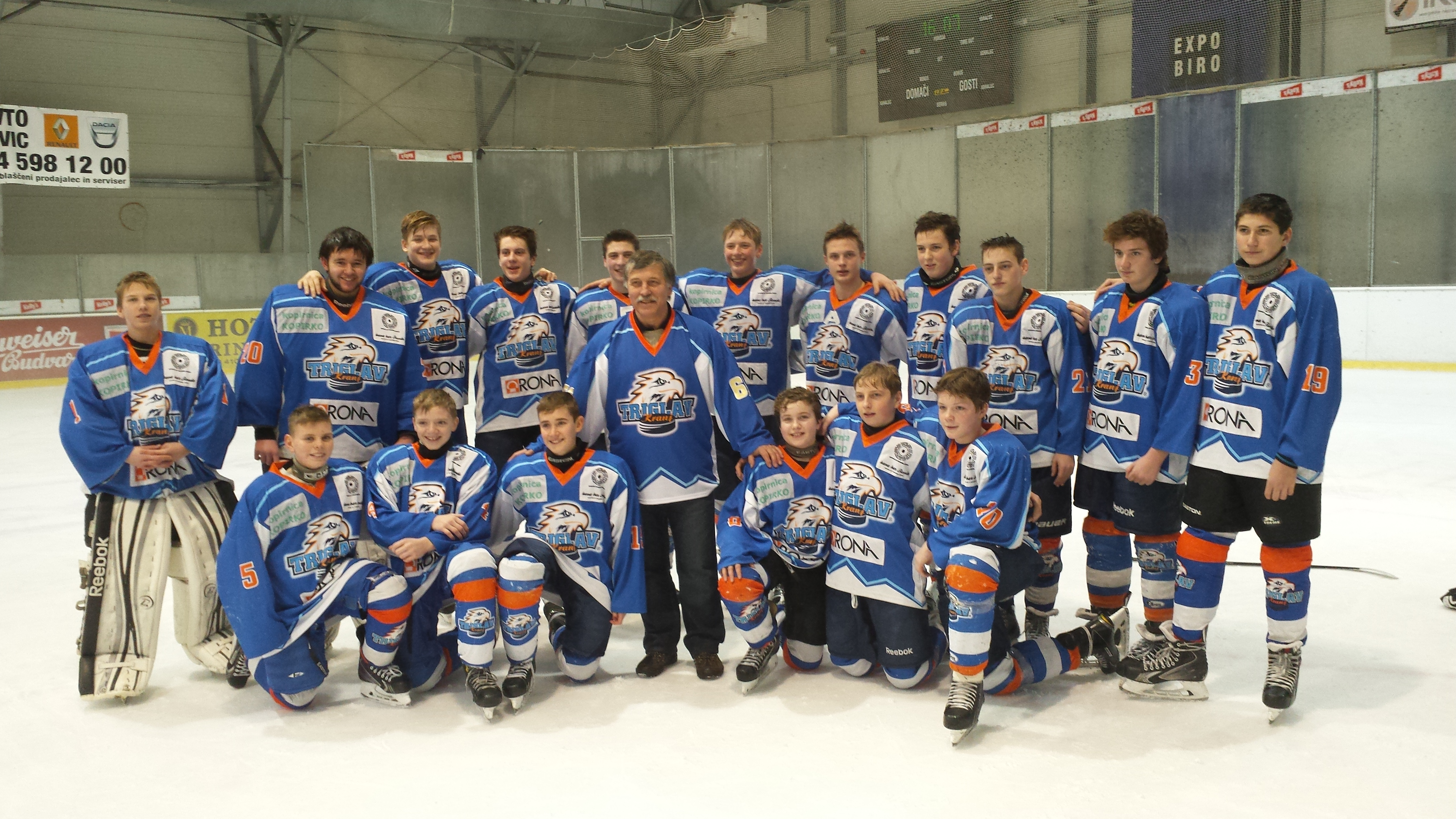 Hokejski klub Triglav Kranj, Slovenija. Kadeti-U16 (dečki do 16 let). Na sliki so kadeti letnik 1999, 2000 in 2001. Na sredini stoji trener Edo Hafner.